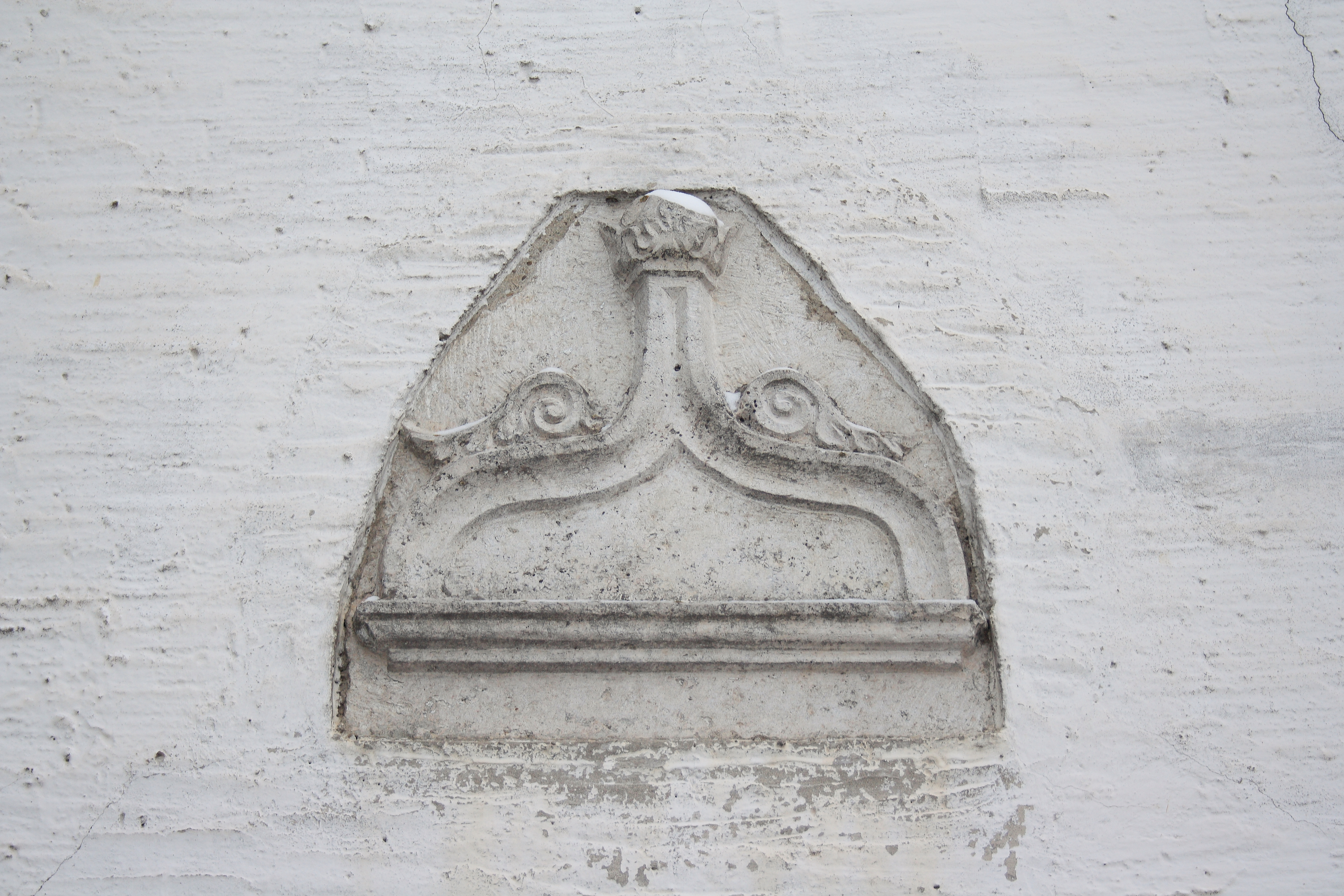 Katholische Pfarrkirche Maria Immaculata in Schwennenbach, einem Stadtteil von Höchstädt an der Donau im Landkreis Dillingen an der Donau (Bayern), über der Tür des nördlichen Anbaus Spolie (Eselsrücken mit Fiale und Voluten)